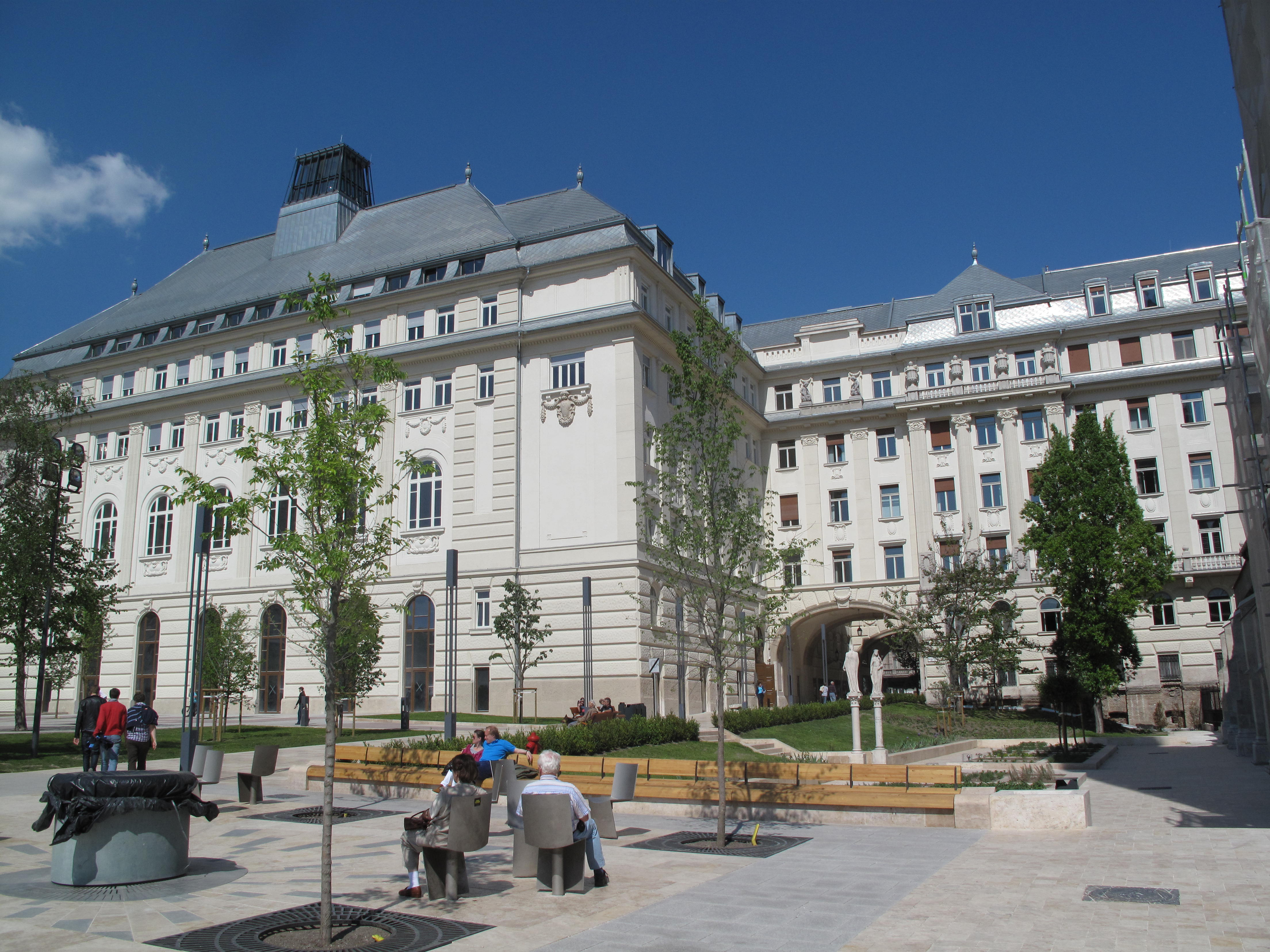 Budapešť